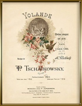 Обложка изд. Юргенсона